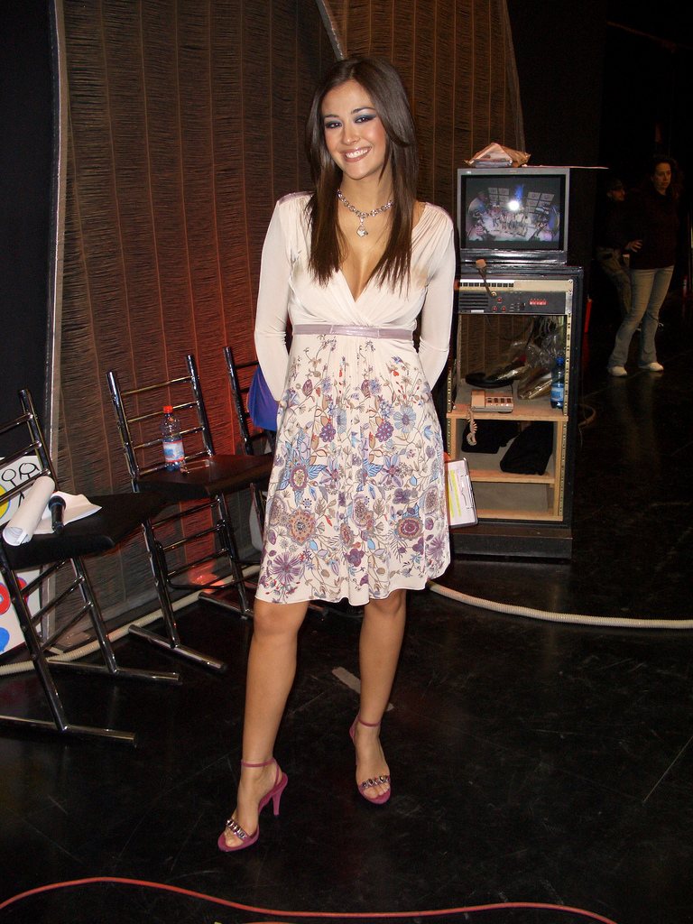 Italian Show Girl Giorgia Palmas